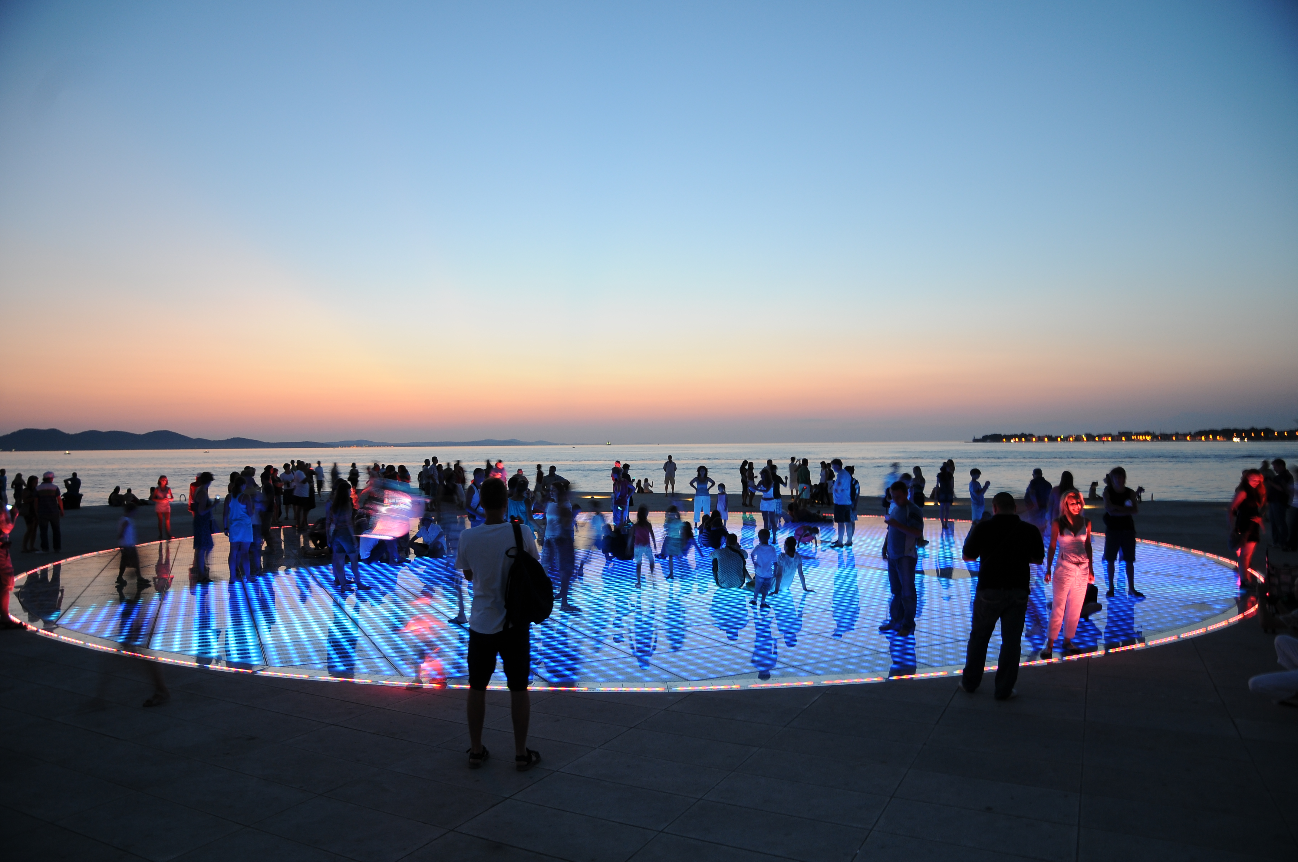 "Gruß an die Sonne" in Zadar. Erbaut nach Plänen des Architekt Nikola Bašić. Der Kreis misst im Durchmesser 22 Meter und besteht aus 300 begehbaren Glasplatten. Zum Sonnenuntergang erzeugt ein effektvolles Lichtspiel, das mit dem Rhythmus der Wellen und der Klänge der Meeresorgel folgt, ein wunderschönes Szenario.